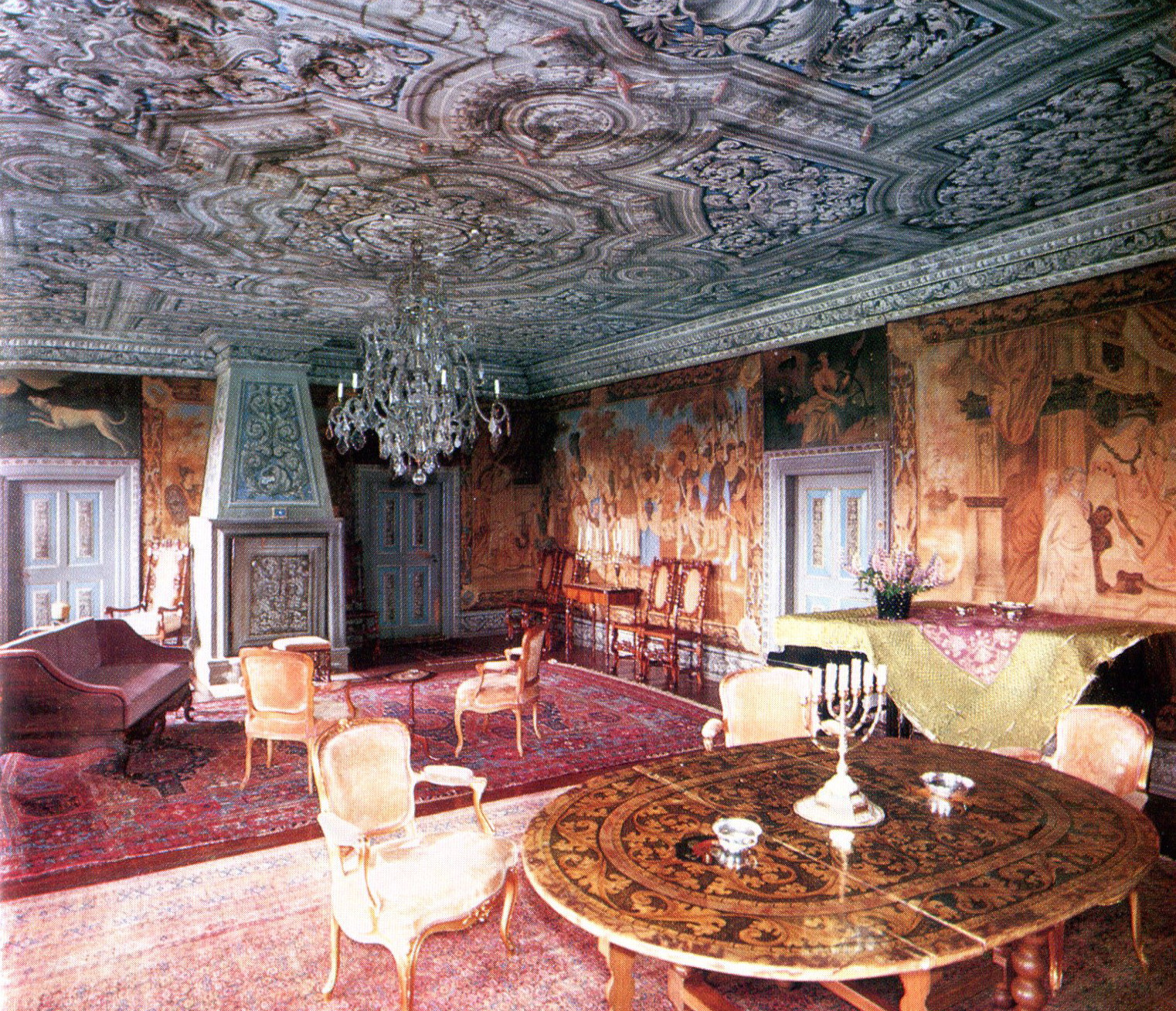 Sandemar stora salongen